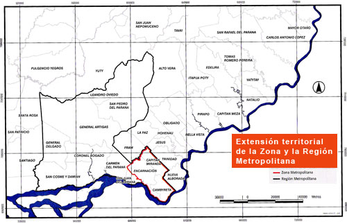 Área metropolitana de encarnación